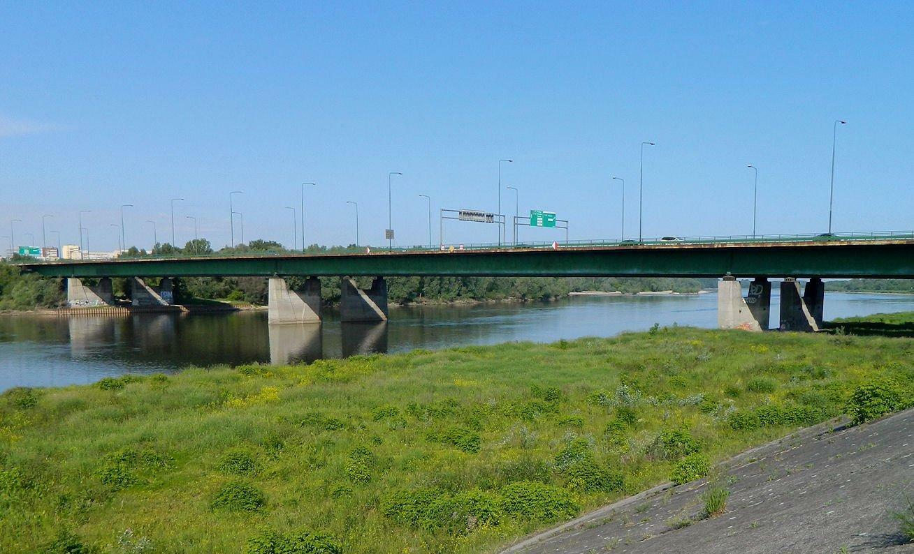 Most Grota-Roweckiego zwany też jako mostem Toruńskim widok od Żerania strona południowa